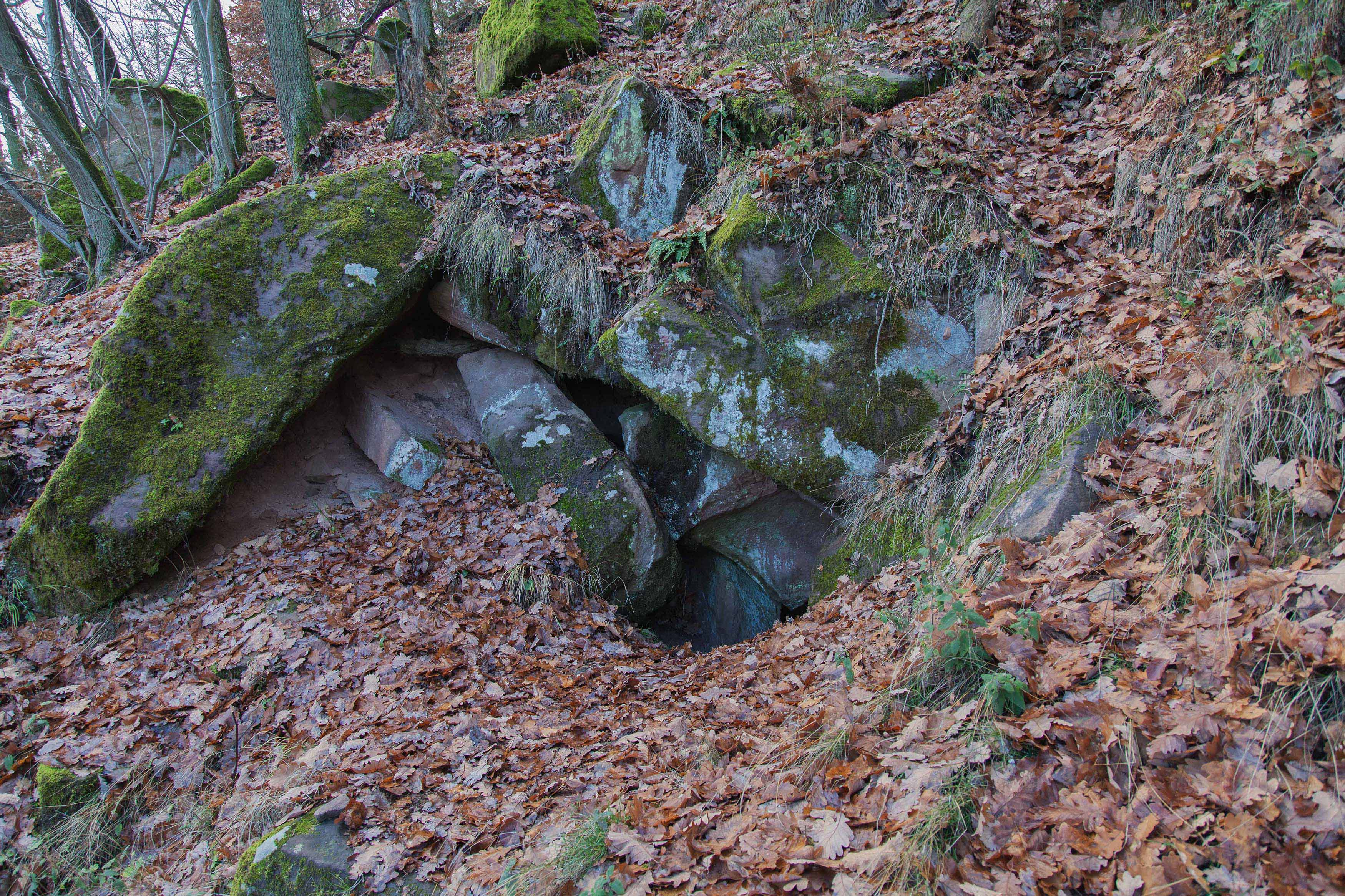 Spalthöhle westlich von Neustadt, am Südosthang des Königsbergs